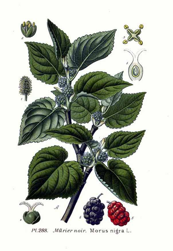 Morus nigra L.